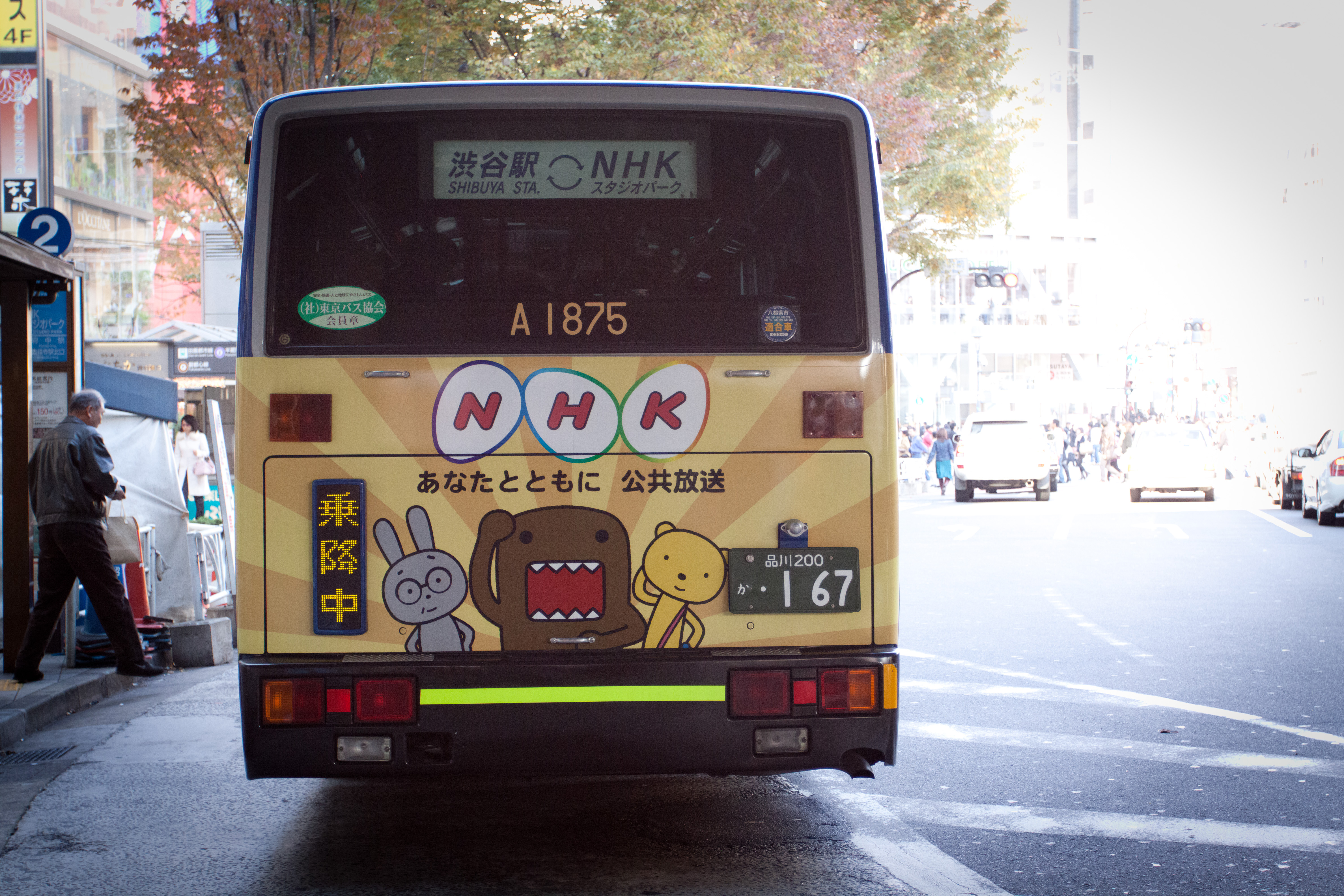 Shibuya station